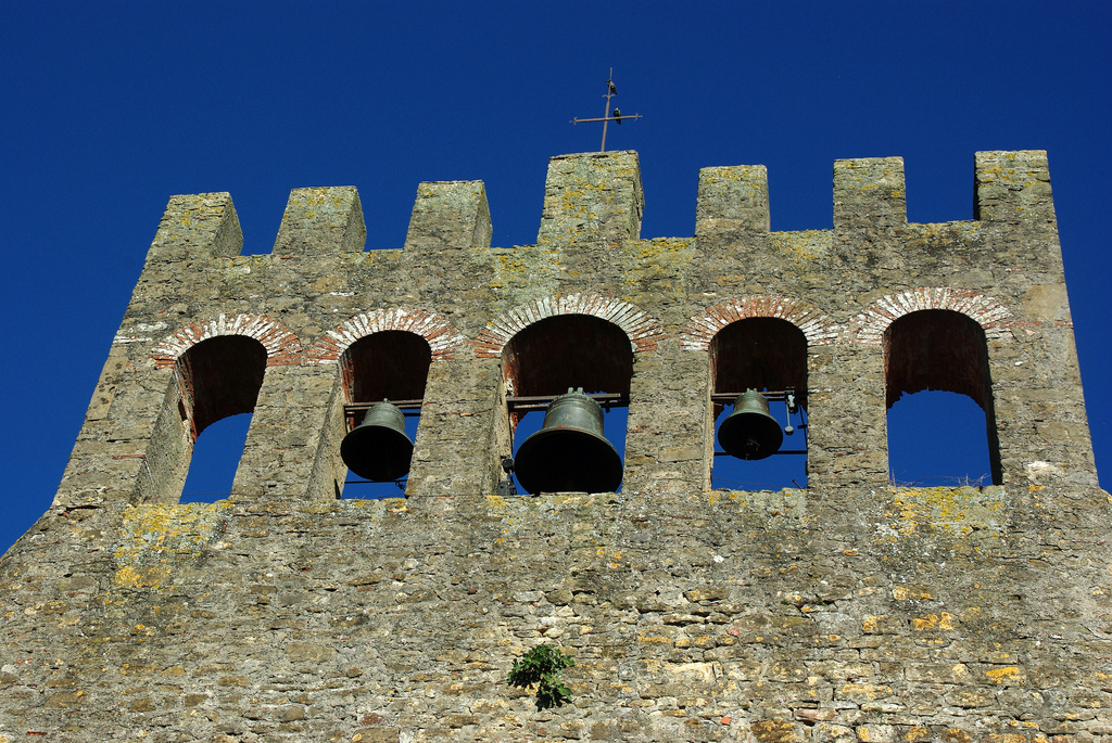 Détail du clocher-mur à cinq baies, surmonté de créneaux. This building is en partie classé, en partie inscrit au titre des Monuments Historiques. .